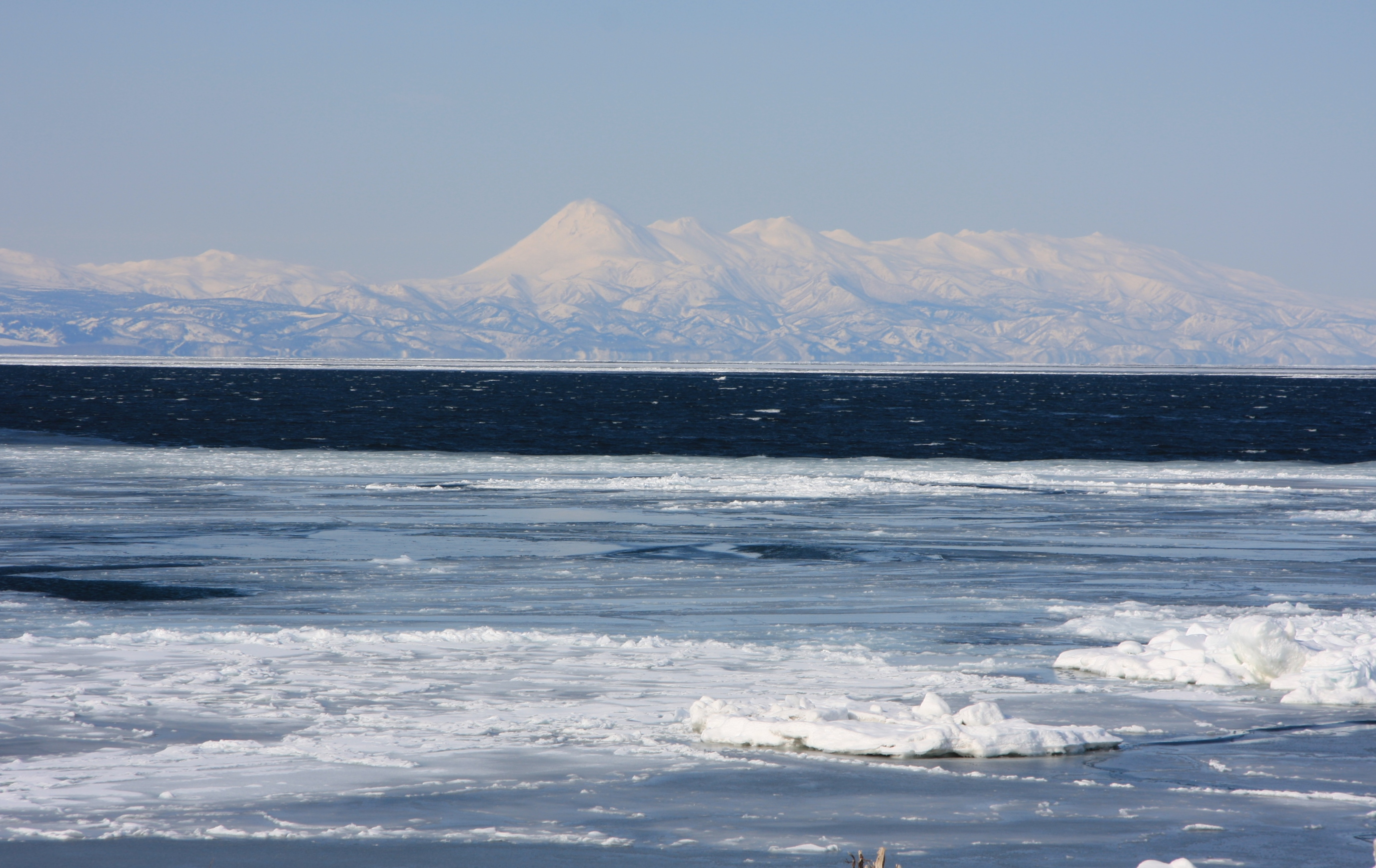 羅臼岳 野付半島より望見